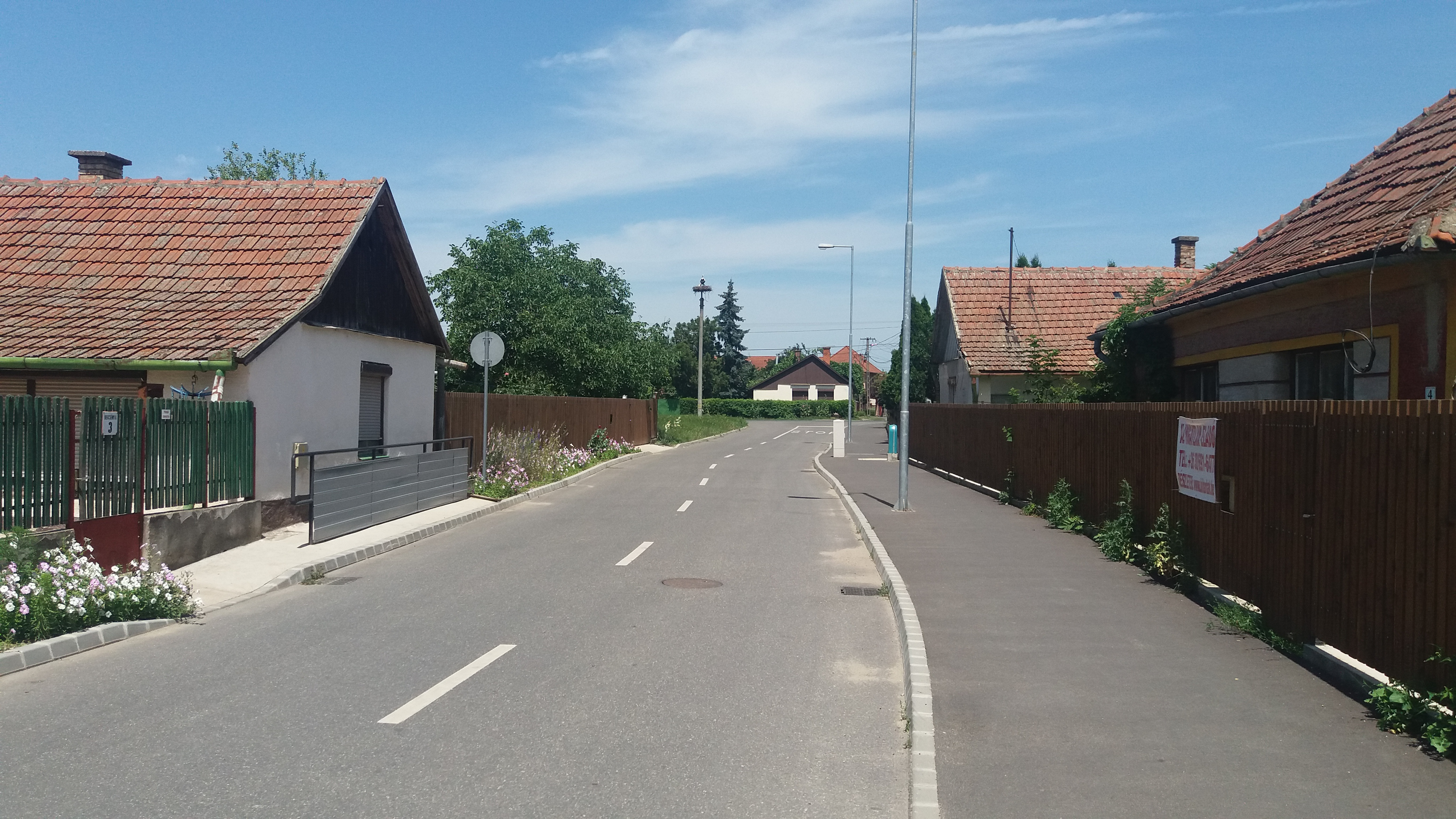 Berettyóújfalui utcakép